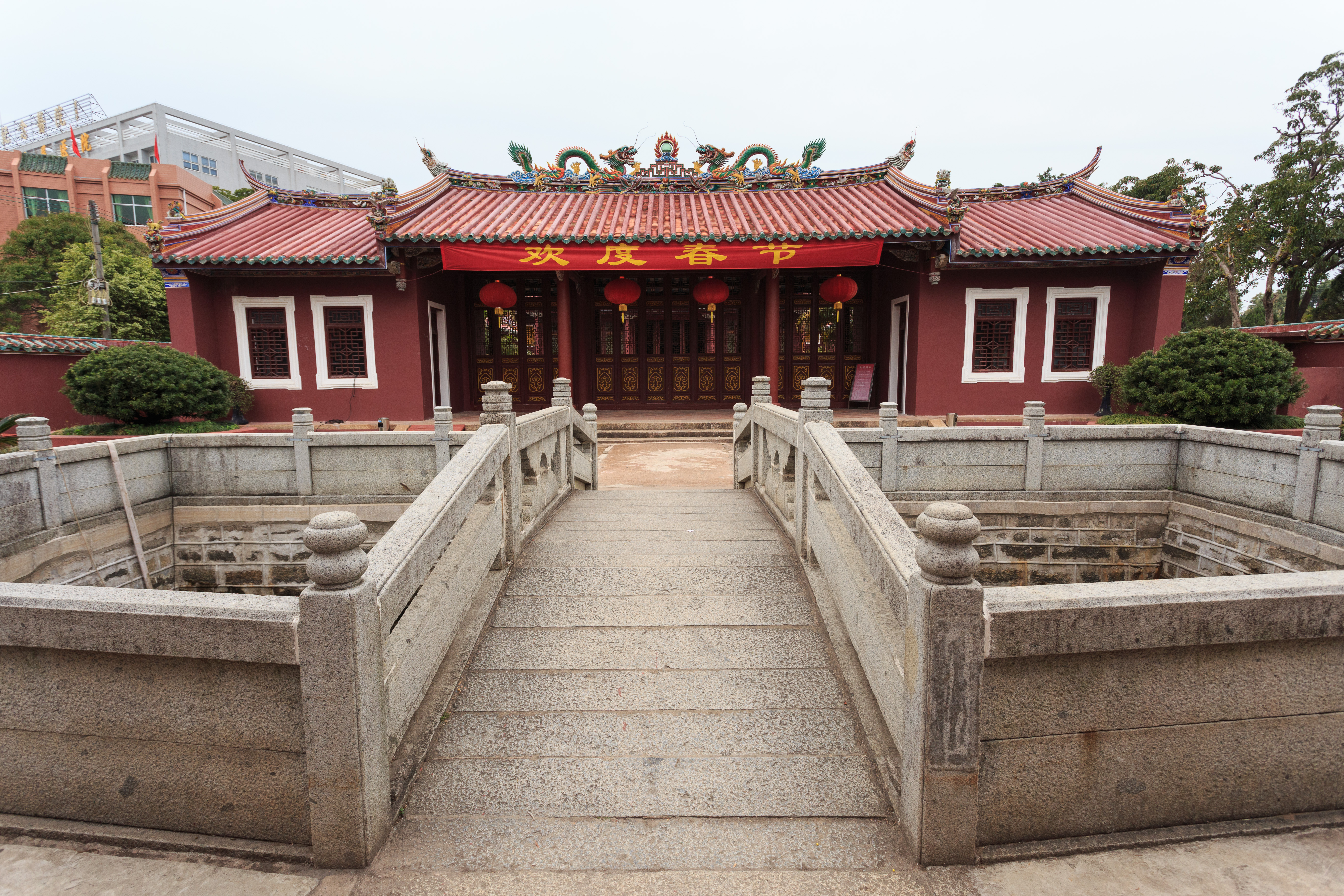 海丰红宫、红场旧址—— 大成门